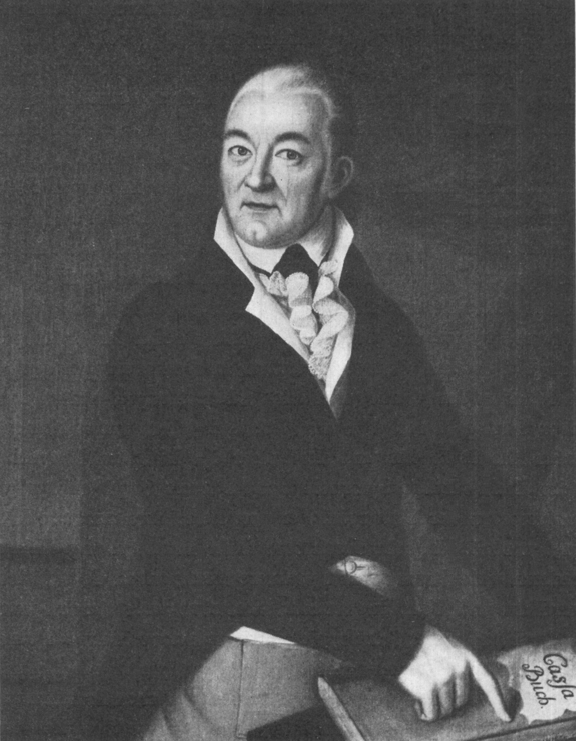 Sigismund Leberecht Schlegel (1750–1812) Breslauer Händler, 1809 Stadtverordneter, 1811 Kommerzienrat